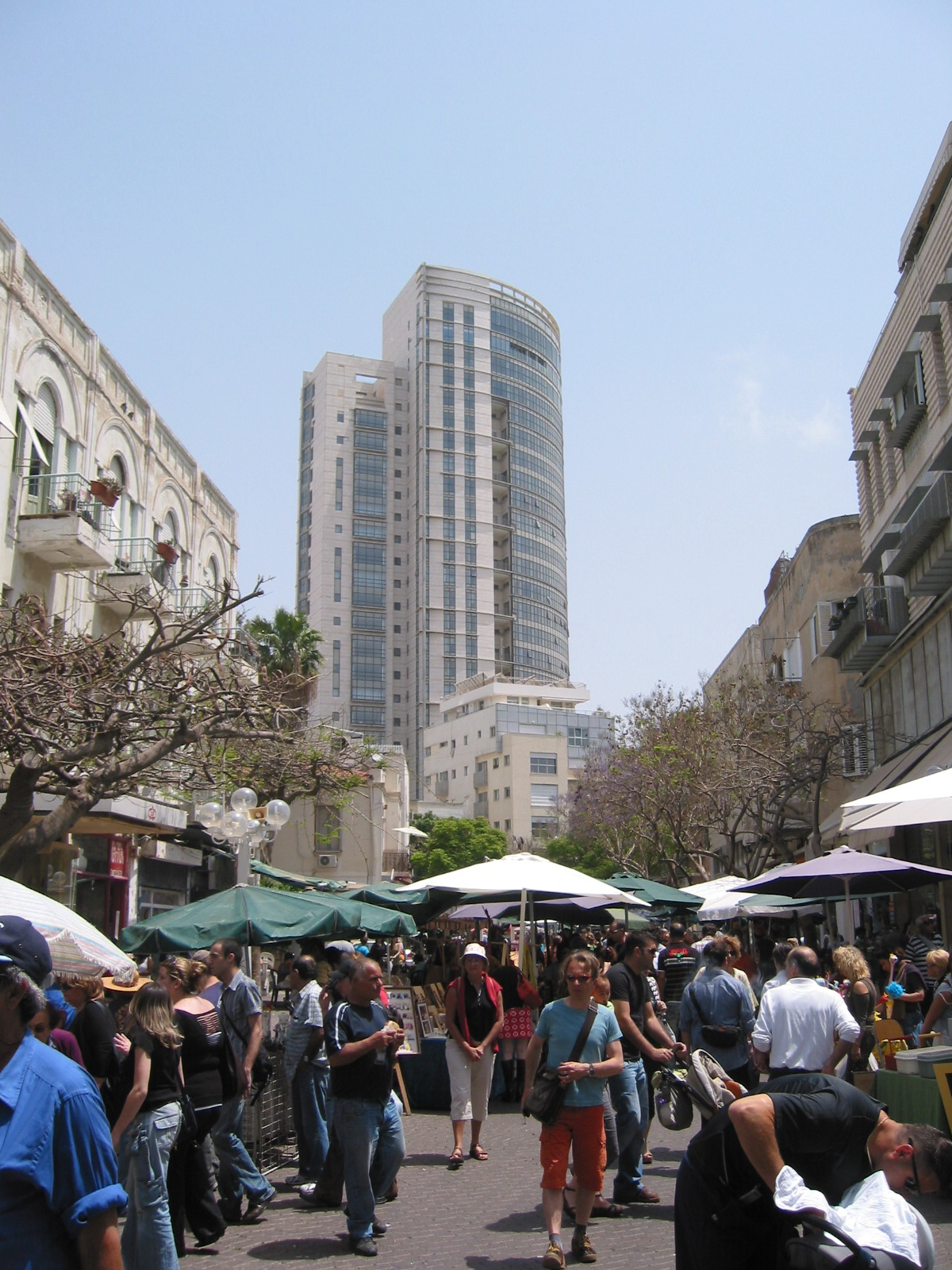 Nahalat Binyamin Street, Tel Aviv